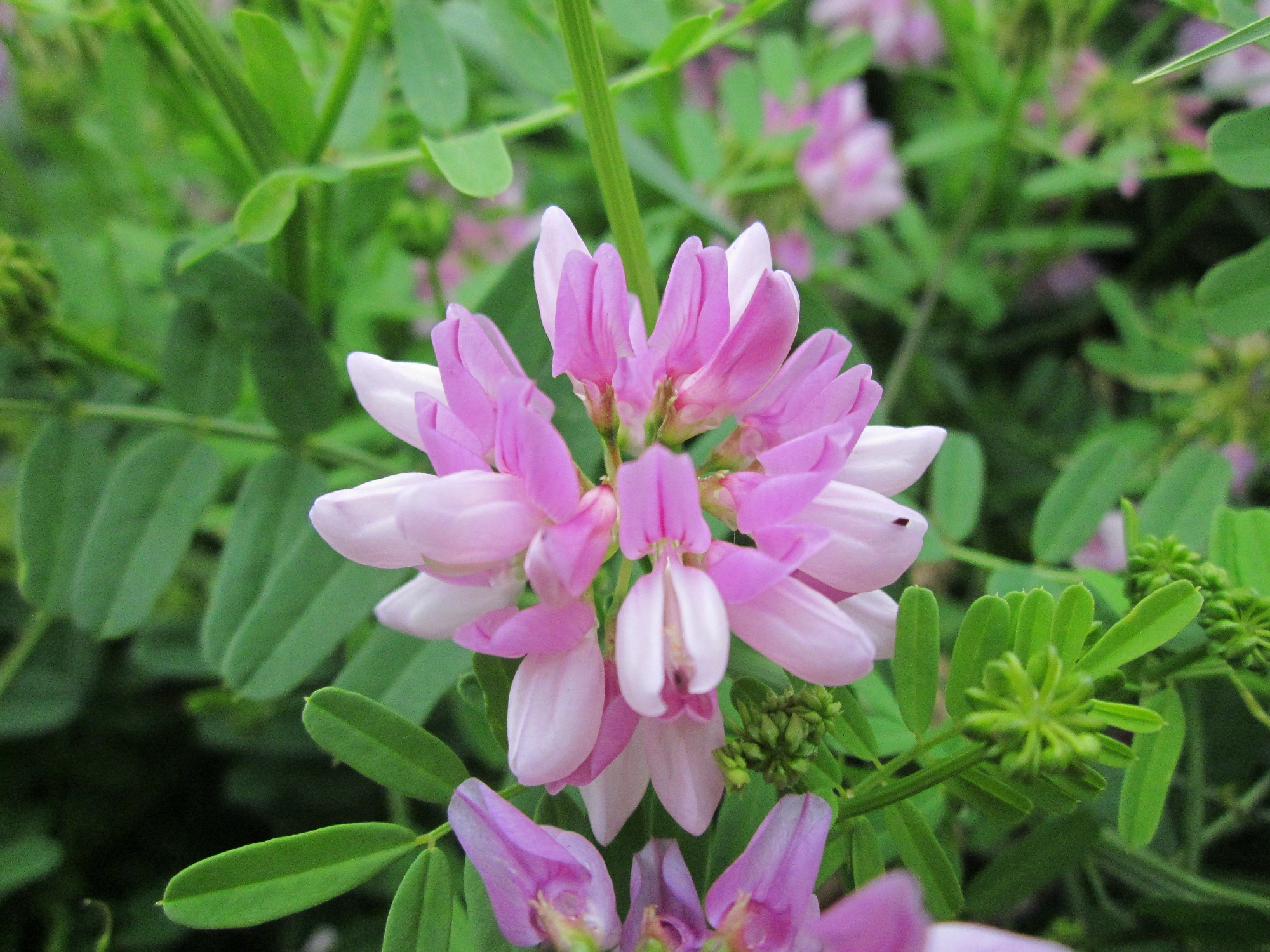 Bunte Kronwicke (Securigera varia) im Hockenheimer Rheinbogen